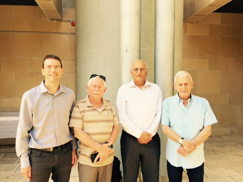 כנס מפקדי "חצב" 2018, מימין לשמאל: אפרים לפיד, אלי זיו, נועם שפירא ואסף אוריון. דורות שונים של מפקדי יחידת חצב , צולם באפריל 2018.